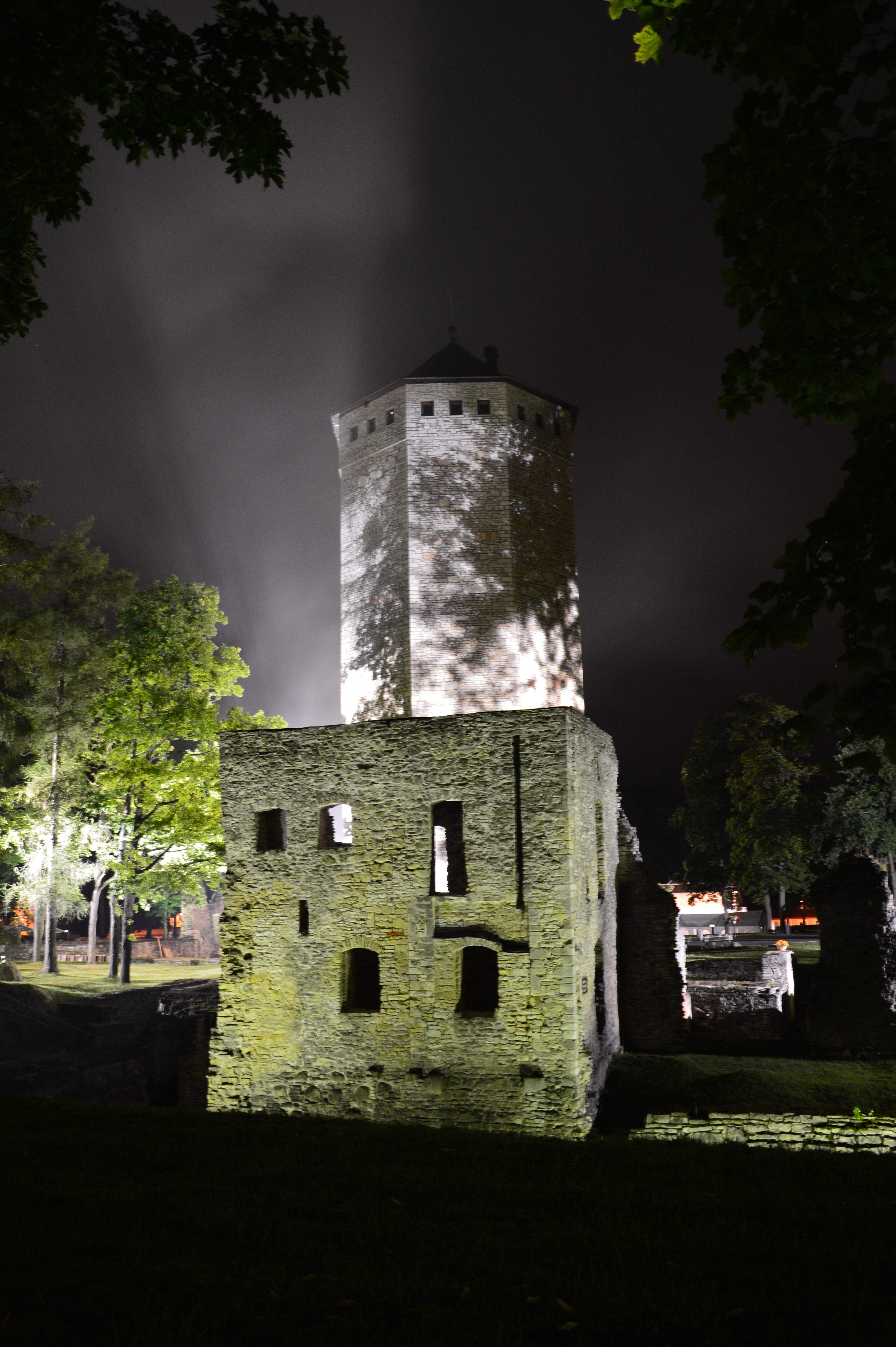 Paide linnuse varemed